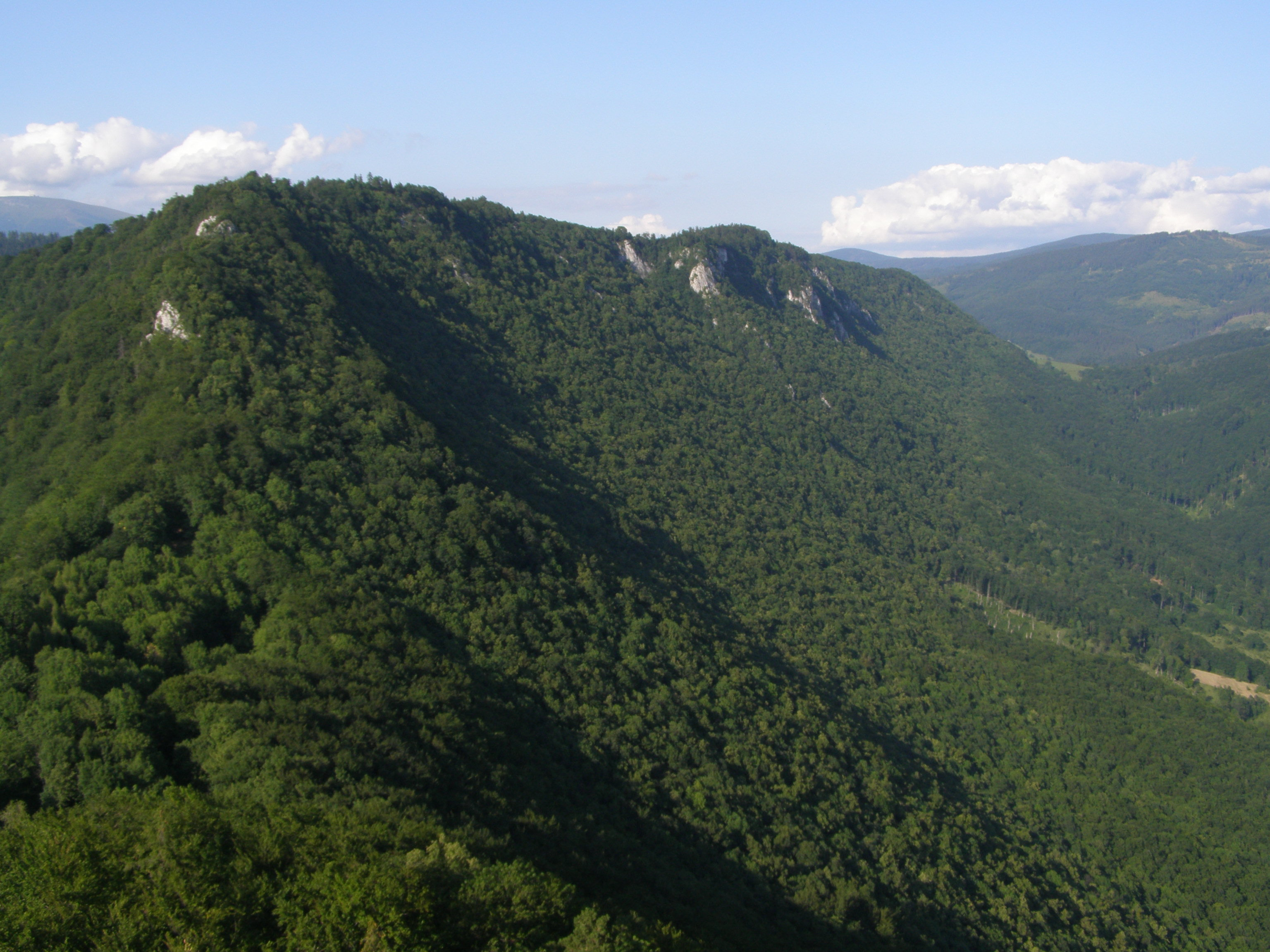 Slovenské rudohoří, Spišsko-gemerský kras, Muráňská planina, pohled z Muráňského hradu na sever na vrchol Šiance (1 042 m)